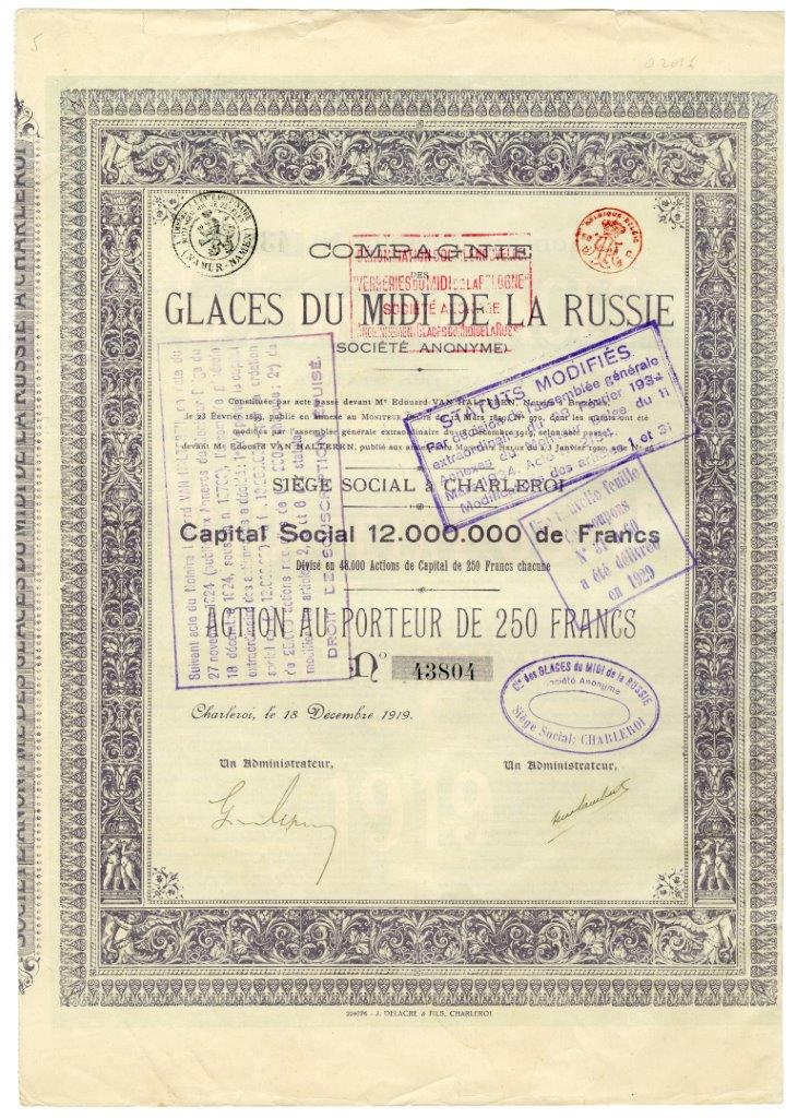 Акция в 250 бельгийских франков на предъявителя Анонимного общества Зеркальных заводов на Юге России. Г. Шарлеруа, 1919 г.